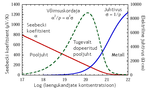 Saavutamaks kõrge võimsuskordajaga termoelektrilist materjali, on vaja leida kompromiss Seebecki koefitsiendi ja elektrijuhtivuse vahel. Tavaliselt kasutatakse termoelektrilise materjalina tugevalt dopeeritud pooljuhte.